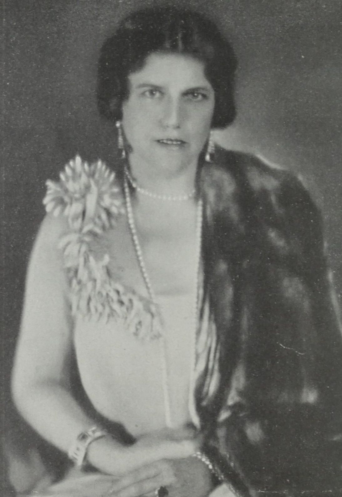 Fotoporträt von Hedwig von Branca, aufgenommen von Yva (1900-1942)